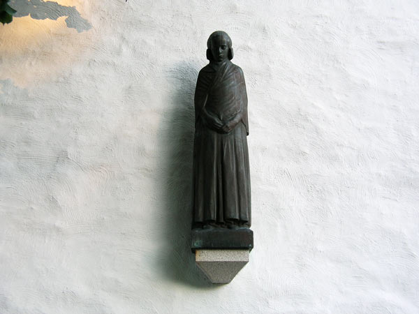 Mikaelikyrkan, Arvika, Diocese of Karlstad, Sweden. "Ödmjukhet" av Christian Eriksson, Mikaelikyrkan.